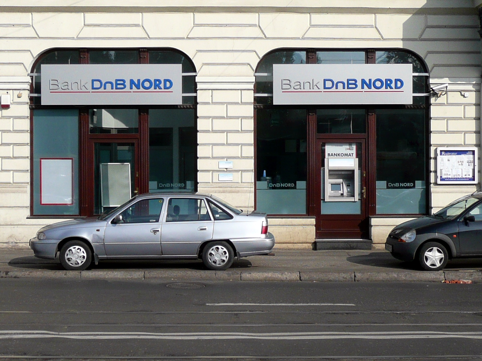 Oddział Banku DnB NORD w Bydgoszczy, ul. Focha 12